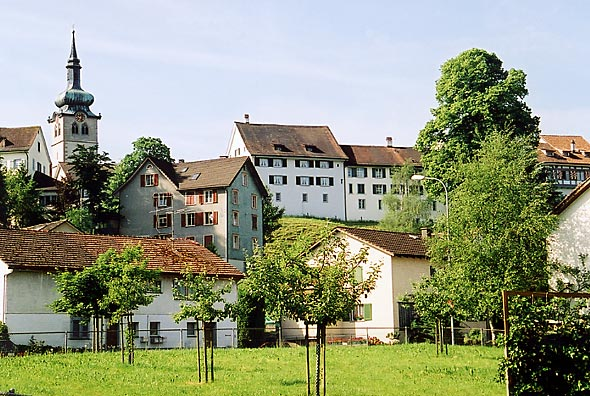 Altstadt von Bischofszell